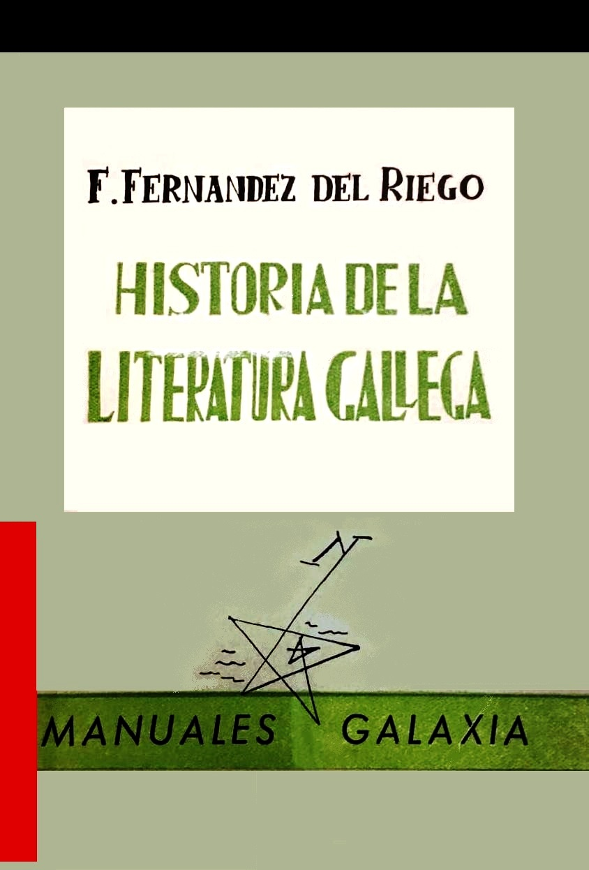 Historia de la literatura gallega. F. Fernández del Riego. Manuales Galaxia